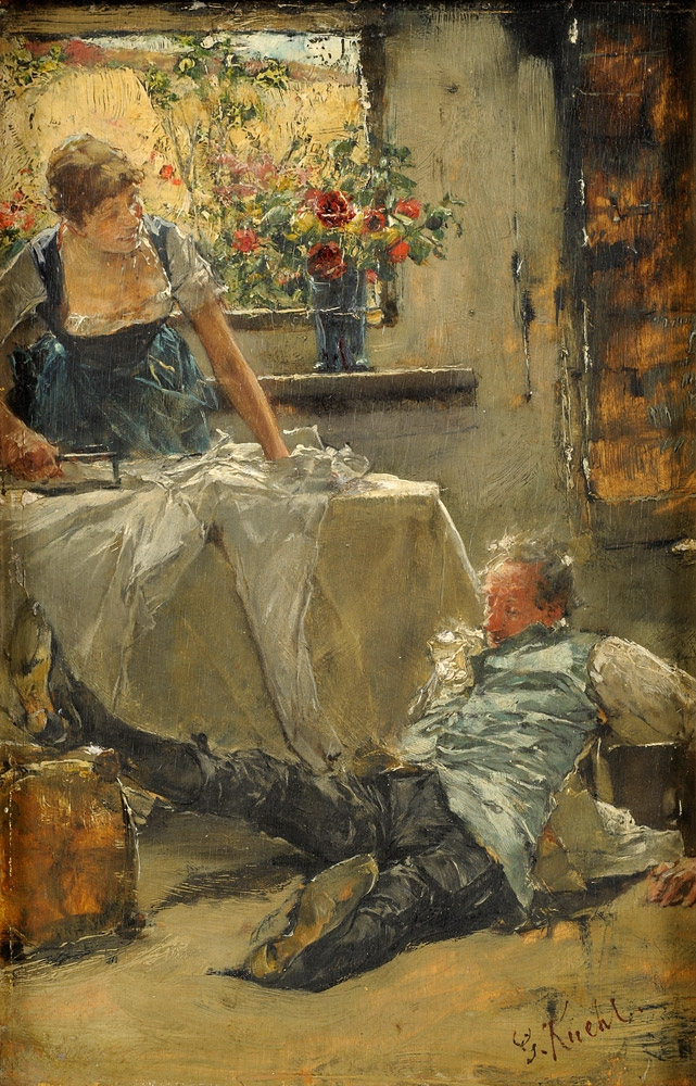 Petit Malheur. Signiert. Öl/Holz, 22,5 x 14 cm